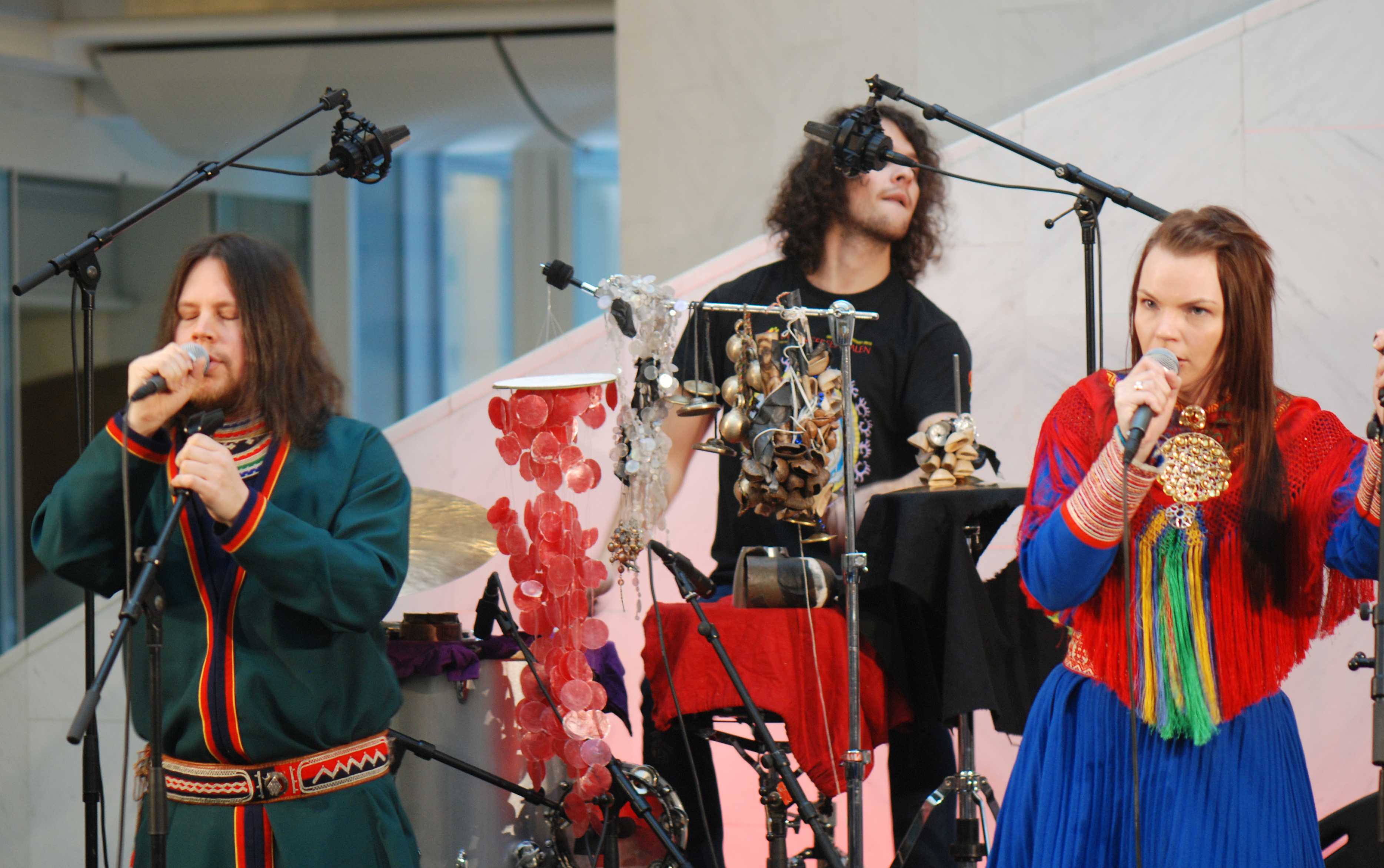 Lunsjkonsert i regjeringskvartalet med Adjágas 6. februar 2012.